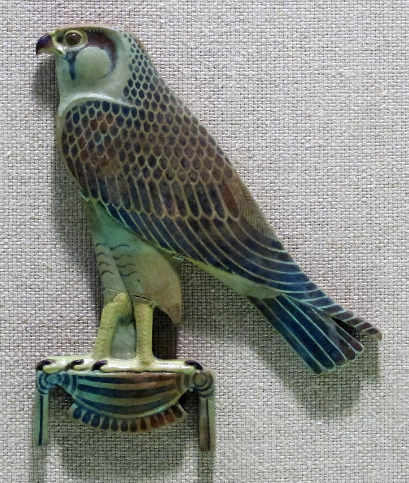 Collezione del Metropolitan Museum, NYC